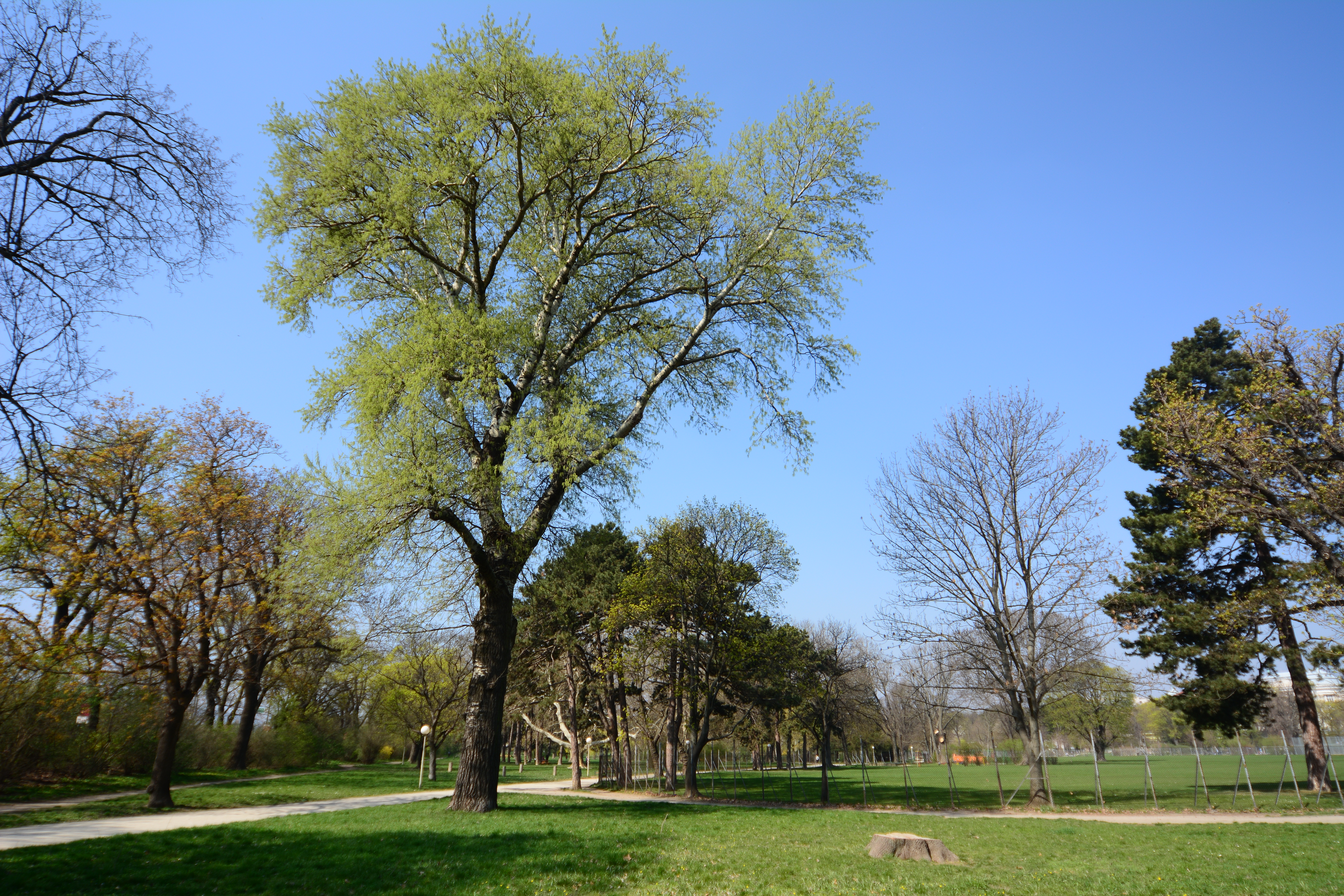 Graupappel (Populus x canescens) This media shows the natural monument in Vienna with the ID 444.